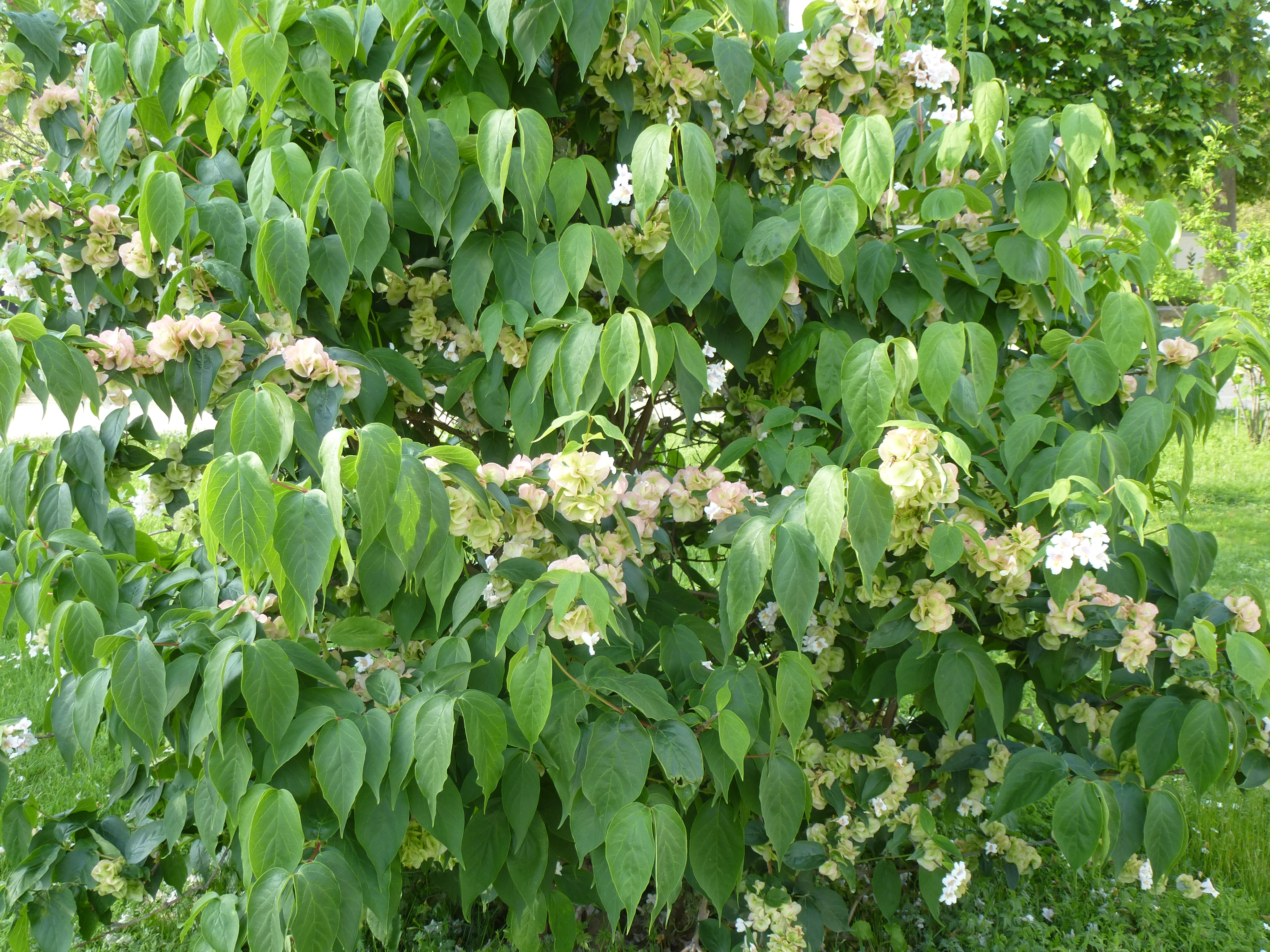 Dipelta floribunda en mai. Jardin des Plantes, Paris, Ile de France, France.